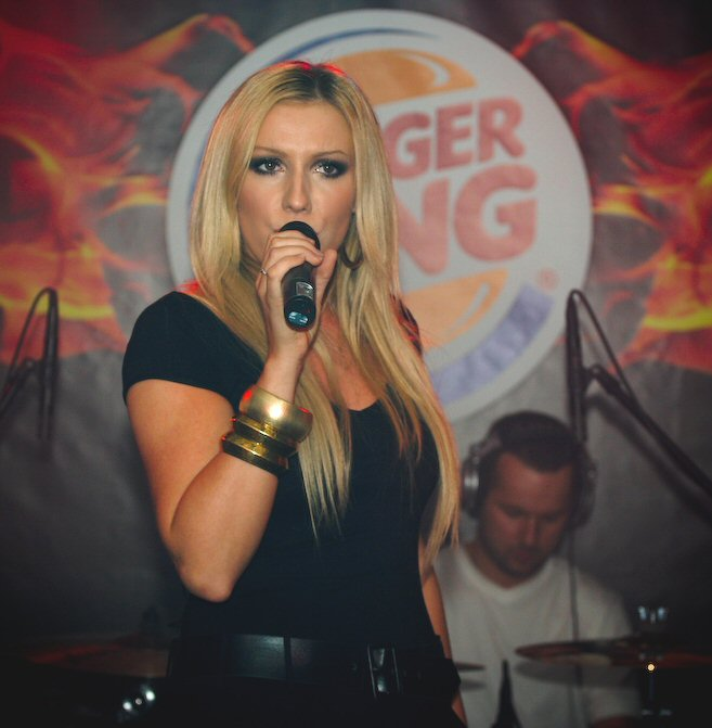 Kasia Cerekwicka